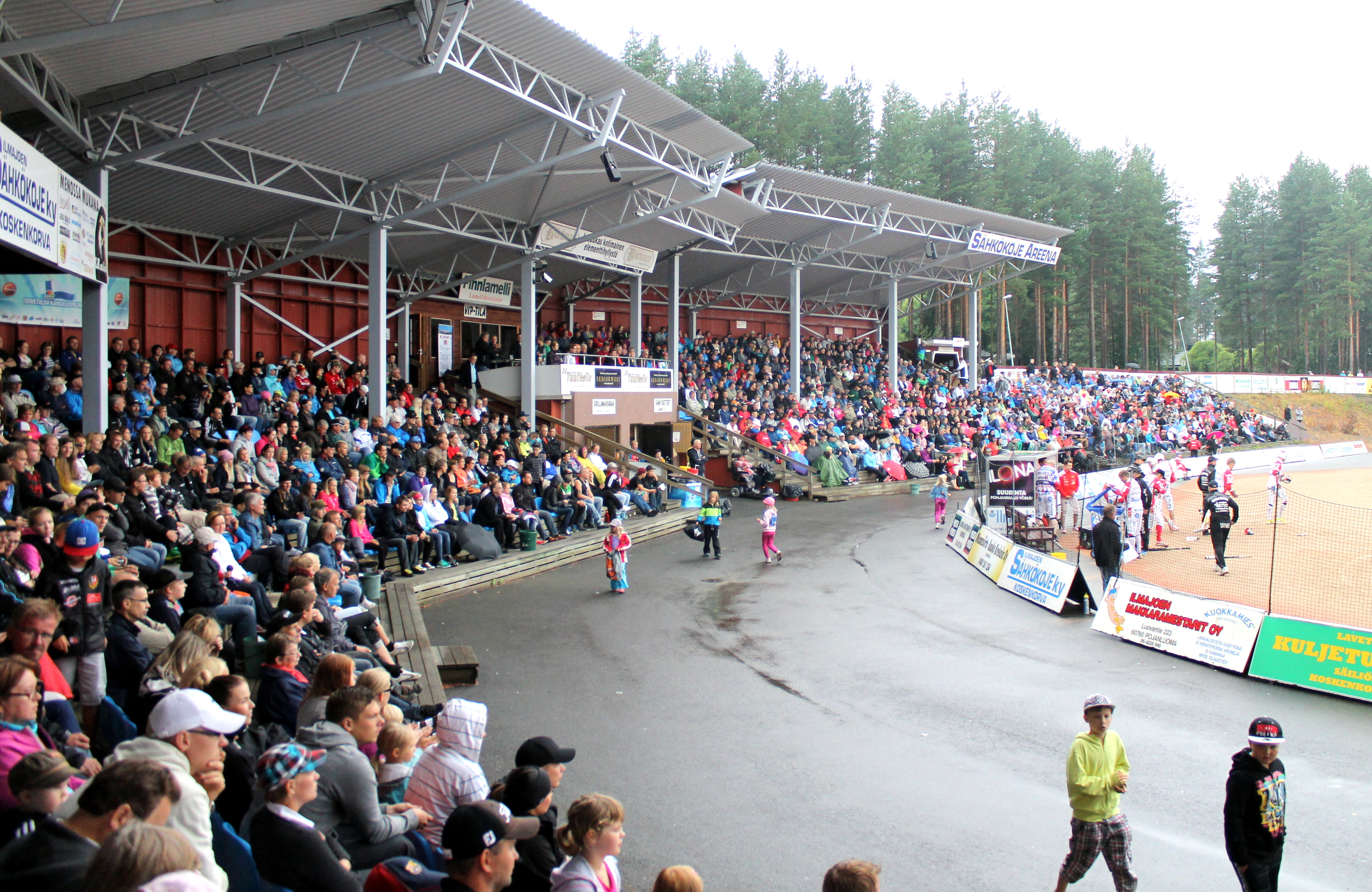 Koskenkorvan pesäpallostadion